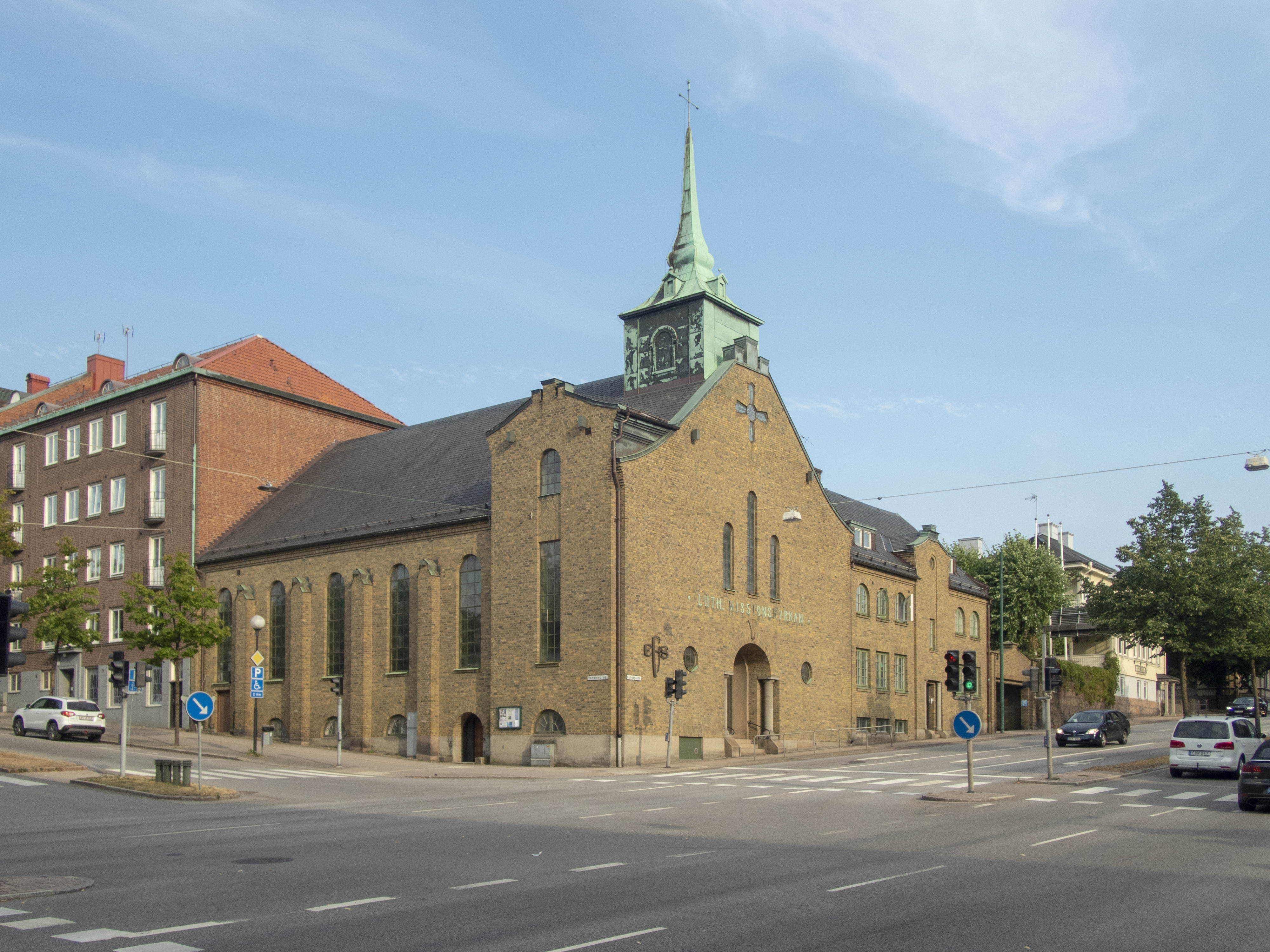 Lutherska missionskyrkan, Kungsgatan 23 Borås. Byggnadsår 1929-1930. Arkitekt: Albin Lönnqvist